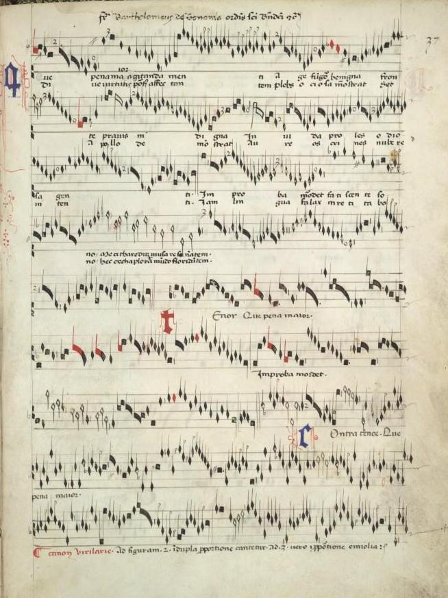 Manuscrit de Modène